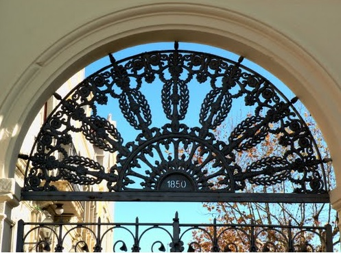 Porta Escoles Públiques.